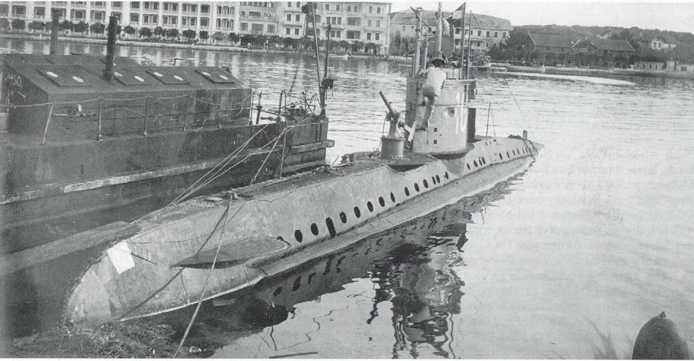 K.u.K. U-10, das ehemalige SM UB-1 der kaiserlichen deutschen Kriegsmarine Im Hafen von Pola